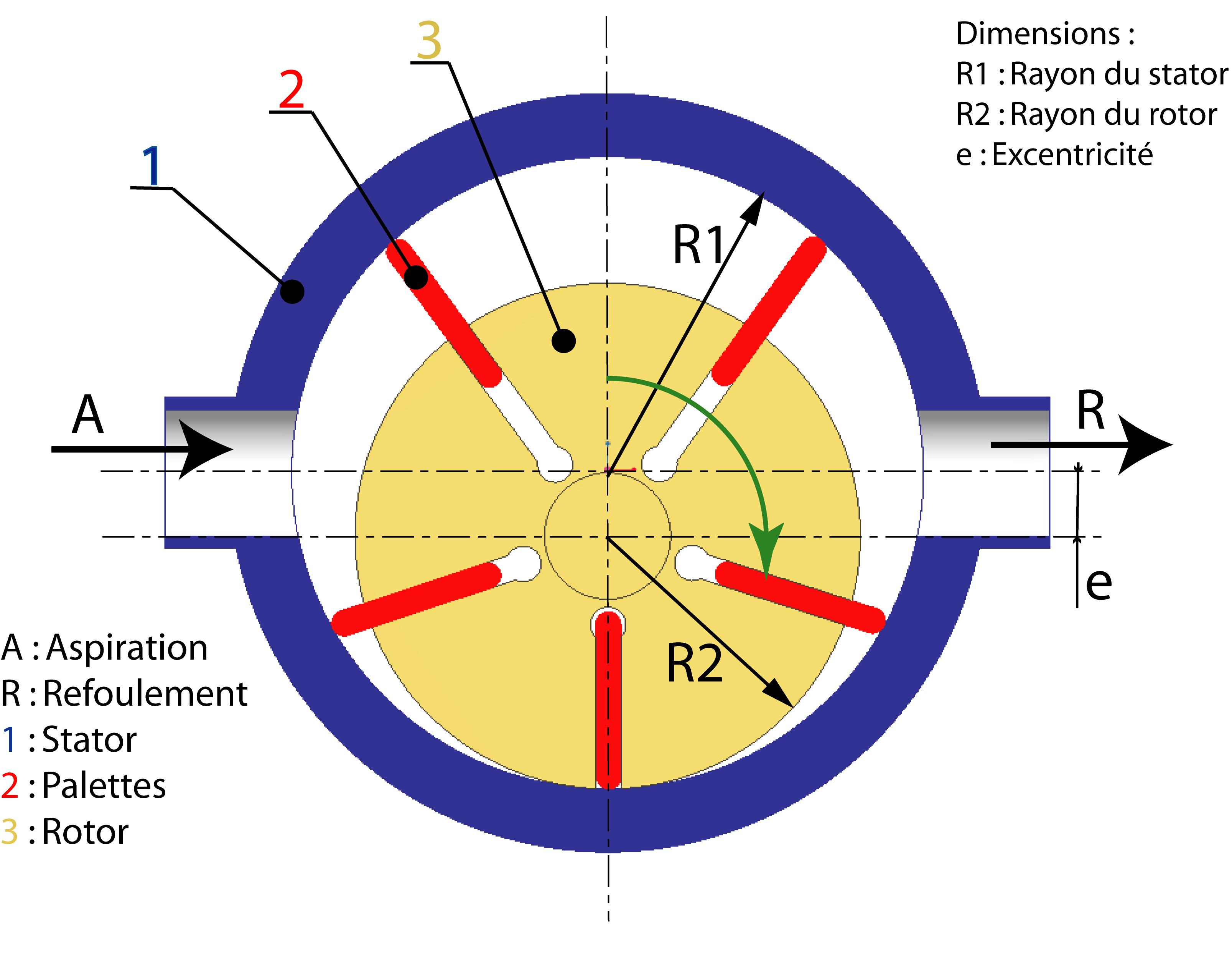 Schéma annoté d'une pompe à palettes excentrique Auteur: Xavier Lory